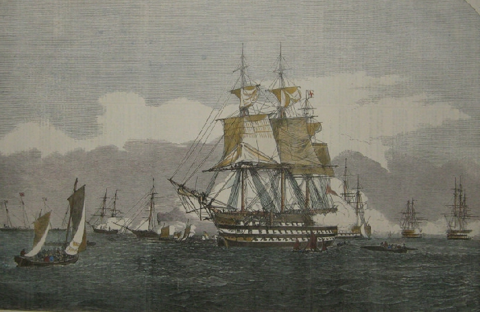 HMS Neptune (1832).